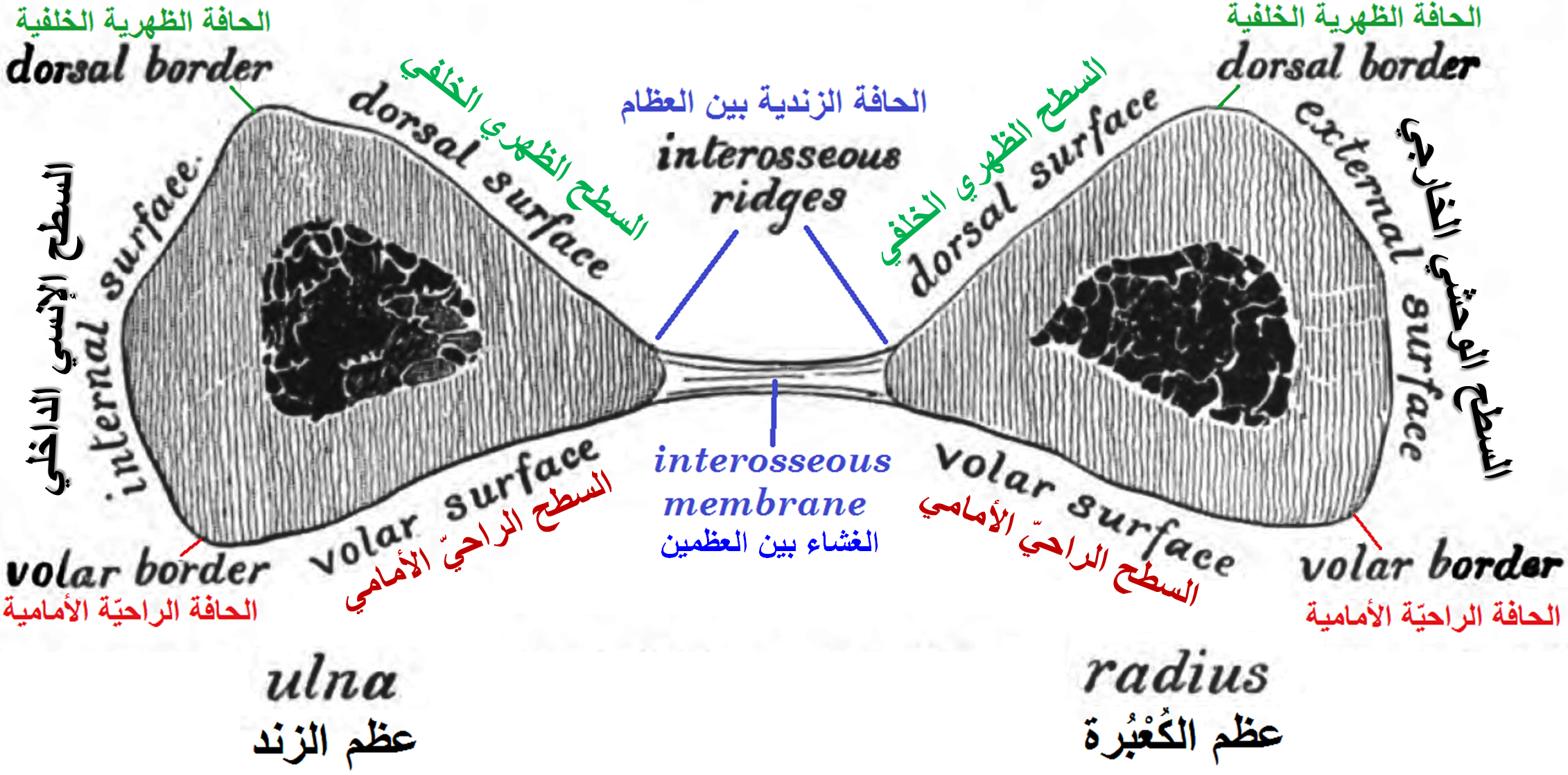 أسطح وحواف عظمتي الزند والكعبرة - قطاع مستعرض في الساعد الأيسر. Borders and Surfaces of : ulna and radius , a cross-section in left arm.